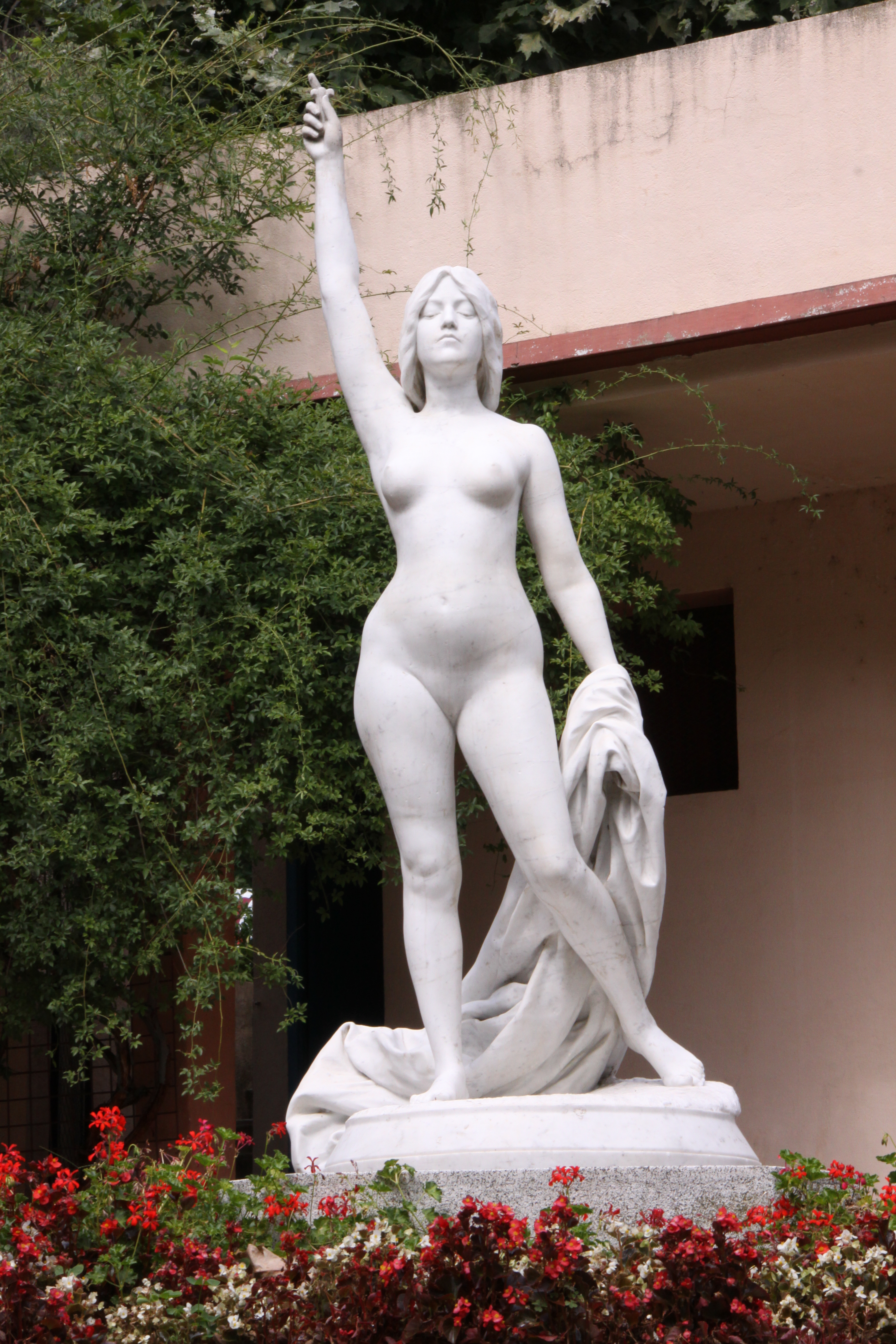 « La Vérité Sortant du Puits » œuvre du sculpteur Fanny Marc (1858-1937). Cette statue d’ une jeune femme nue sortant d’ un puits représente l’ allégorie de la « Vérité ». La « Vérité » est sans fard et sans vêtement (jeune femme totalement nue) et il faut la rechercher dans les profondeurs de l’ esprit (le puits). L’ allégorie de la « Vérité » représentée de cette manière est quelque peu banale. Elle a été un thème repris par plusieurs peintres et sculpteurs. En observant de plus près cette œuvre, on aperçoit un manche dans la main droite de la statue. Ce manche est probablement celui d’ un miroir dont la partie supérieure a été cassée. En effet, dans les œuvres représentant « La Vérité Sortant du Puits », la jeune femme tient un miroir qui symbolise l’ individu mis face à lui-même. Cette statue de « La Vérité Sortant du Puits » a été placée dans le Jardin de L’ Ancien Théâtre de Verdure situé rue des Thermes à Amélie-les-Bains. Amélie-les-Bains-Palalda, Pyrénées-Orientales, France.